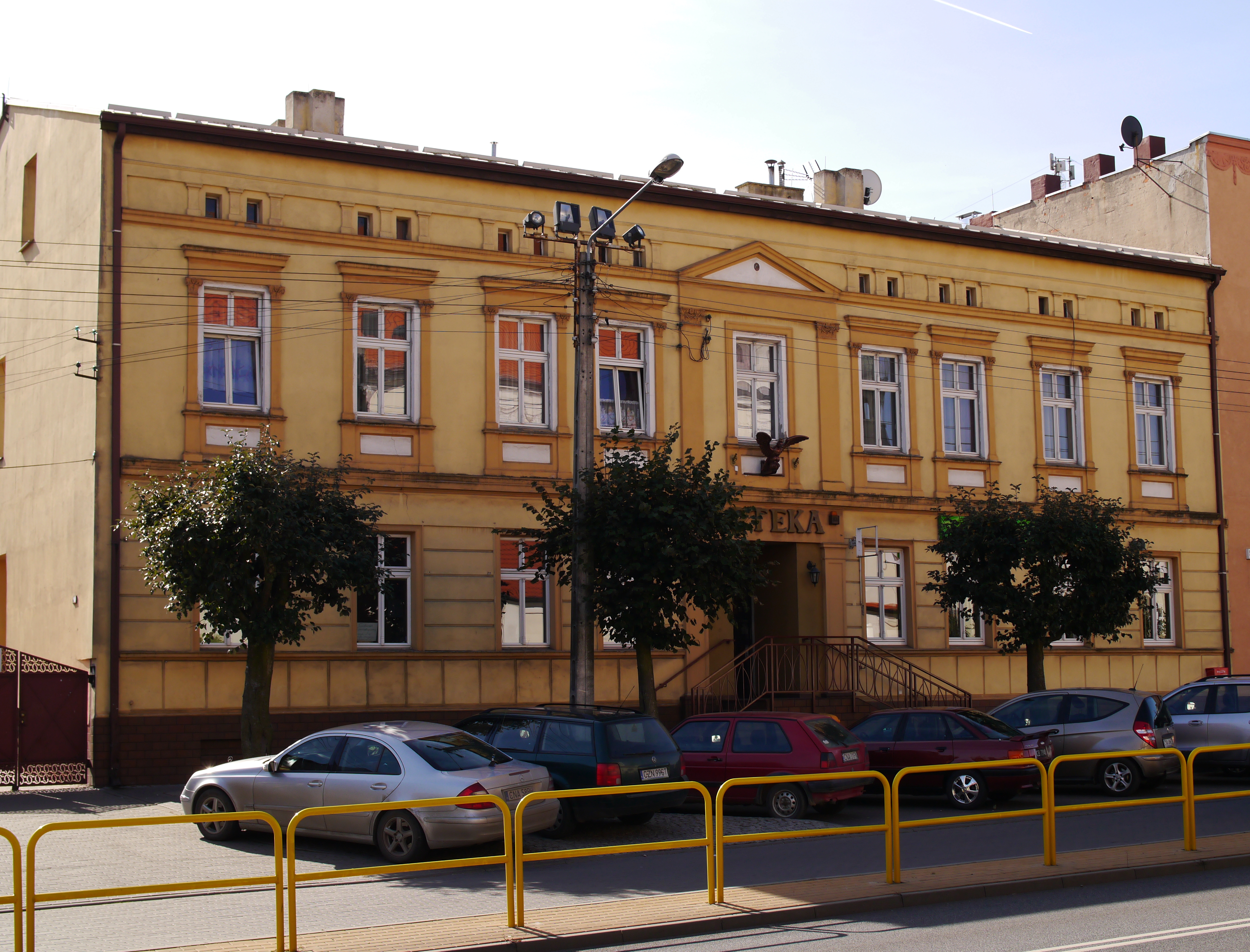 Kcynia, dom, 1836, 1884